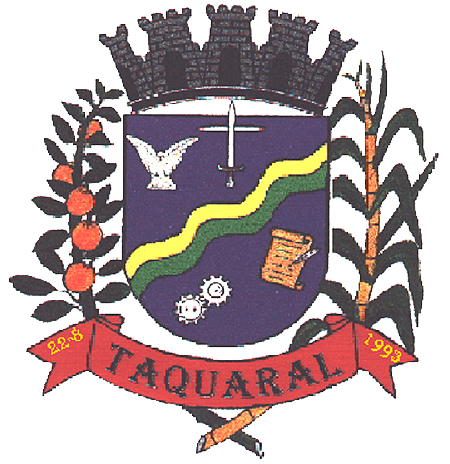 Brasão da cidade de Taquaral, São Paulo, Brasil